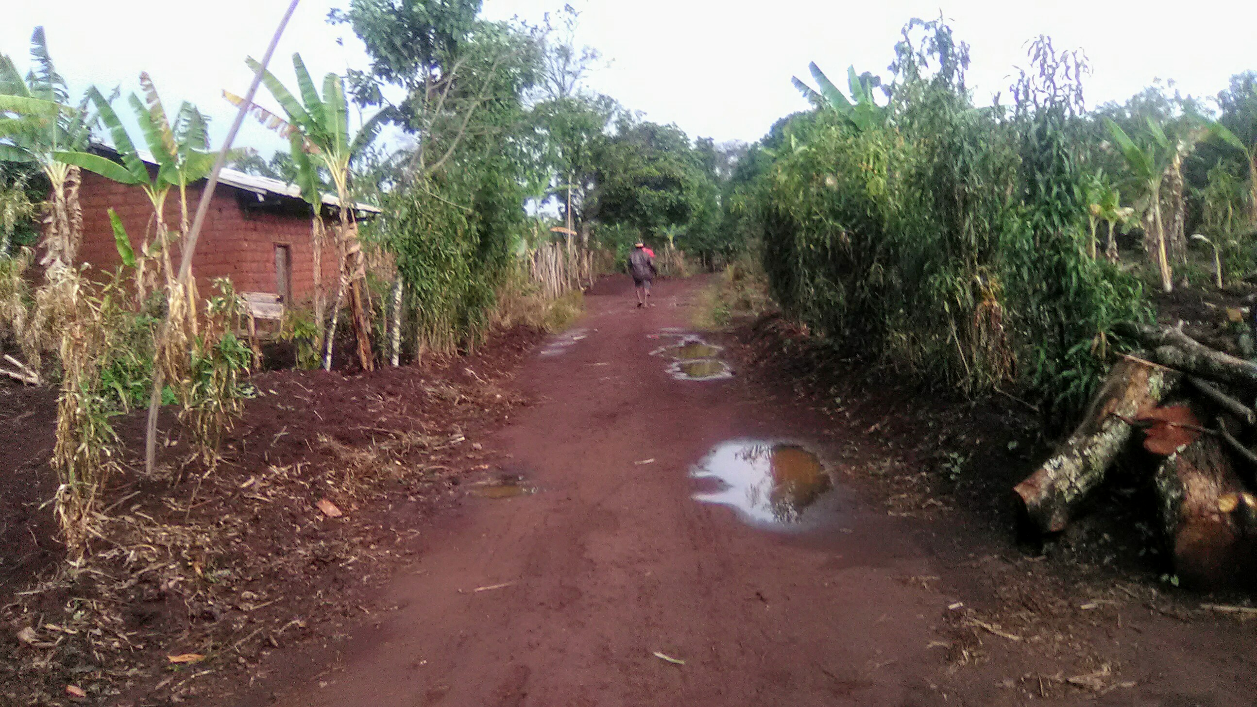 Quelques piétons et des flaques d'eau sur la route This is an image with the theme "Africa on the Move or Transport" from: Cameroon